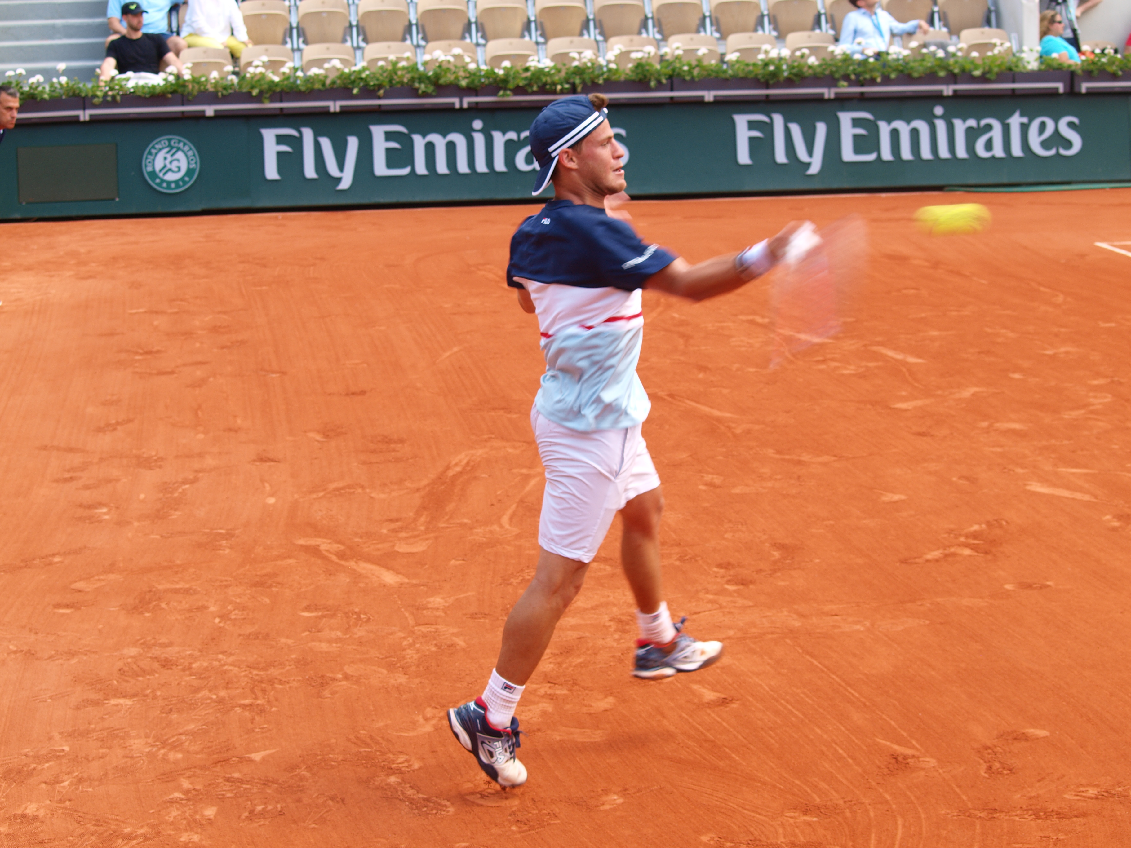 Diego Schwartzman sur le cours Suzanne Lenglen (stade Roland Garros de Paris) le 4 juin 2018, durant son match contre Kevin Anderson